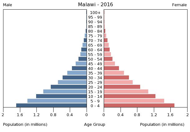 A population pyramid illustrates the age and sex structure of a country's population and may provide insights about political and social stability, as well as economic development. The population is distributed along the horizontal axis, with males shown on the left and females on the right. The male and female populations are broken down into 5-year age groups represented as horizontal bars along the vertical axis, with the youngest age groups at the bottom and the oldest at the top. The shape of the population pyramid gradually evolves over time based on fertility, mortality, and international migration trends.